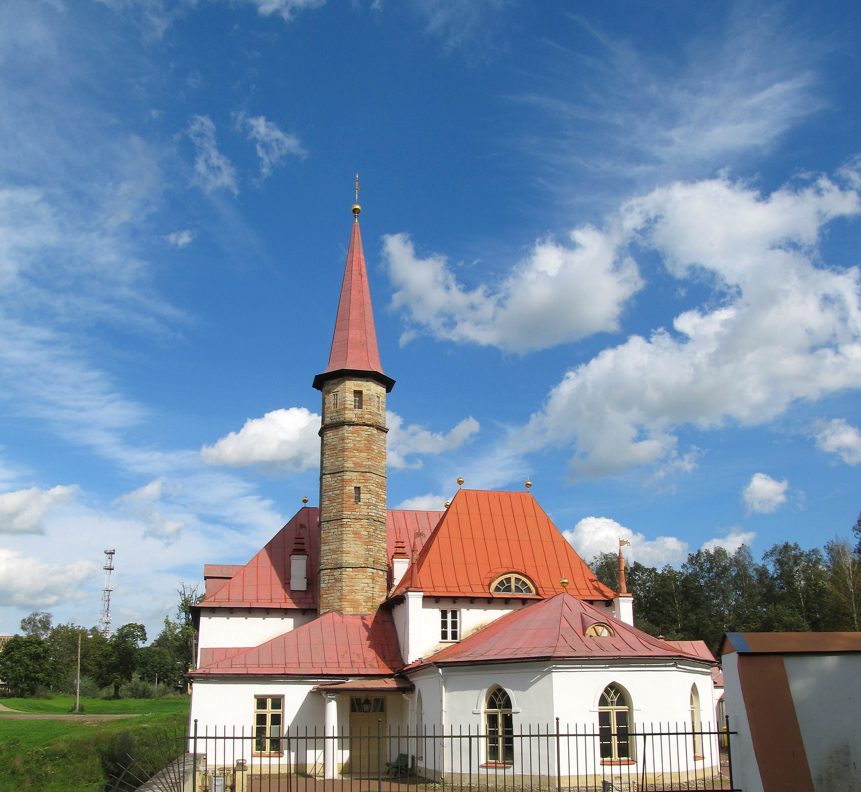 Приоратский дворец в послеобеденное время. Объект культурного наследия народов РФ федерального значения Объект культурного наследия народов РФ федерального значения. Рег. № 471710486600036 (ЕГРОКН).